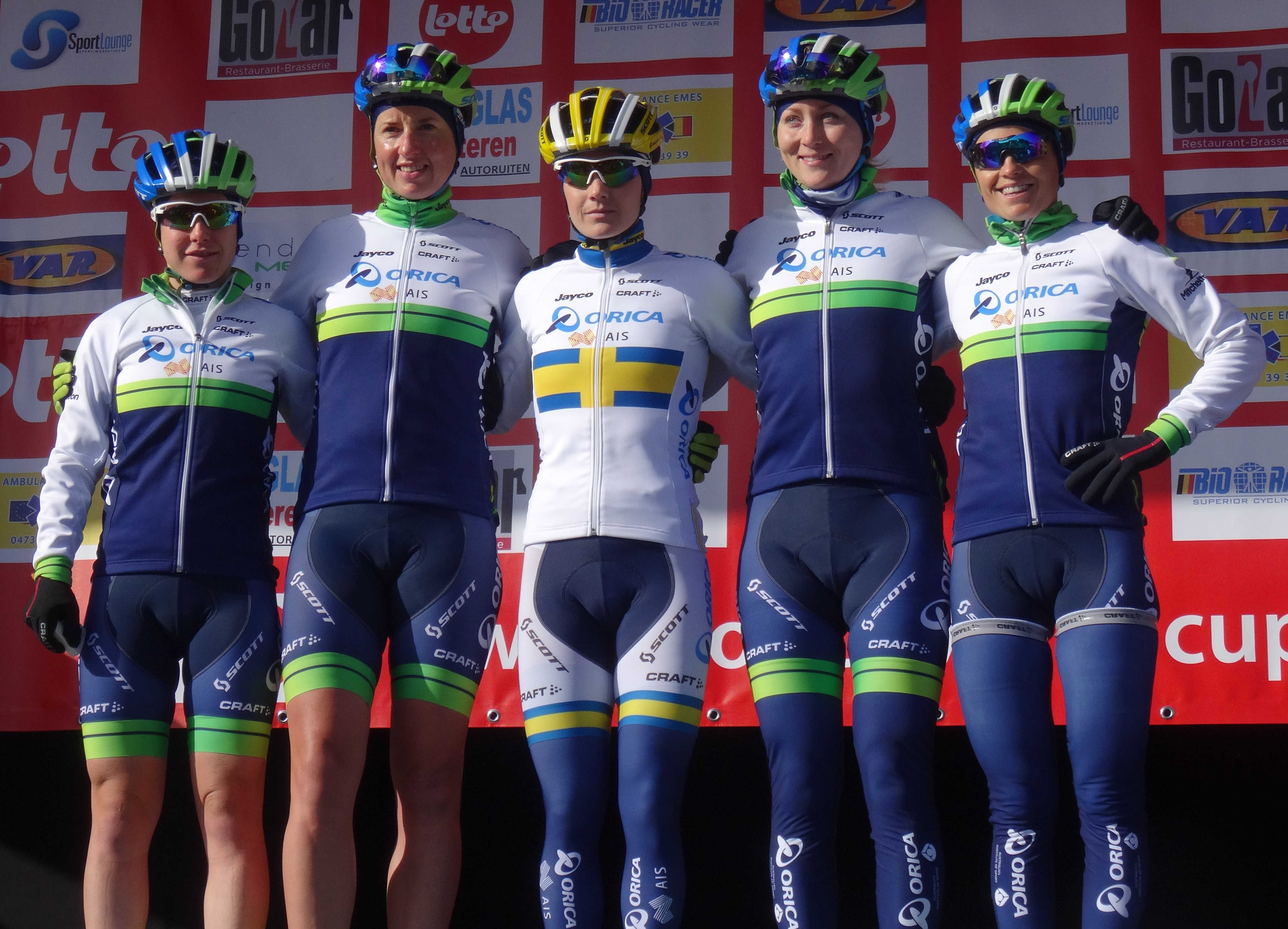 Reportage réalisé le mercredi 4 mars à l'occasion du départ du Samyn des Dames 2015 et du Samyn 2015 à Quaregnon, Belgique.